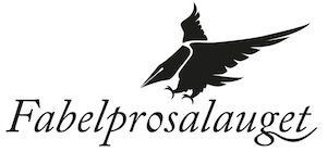 Fabelprosalaugets logo, designet av Kristian Kapelrud.